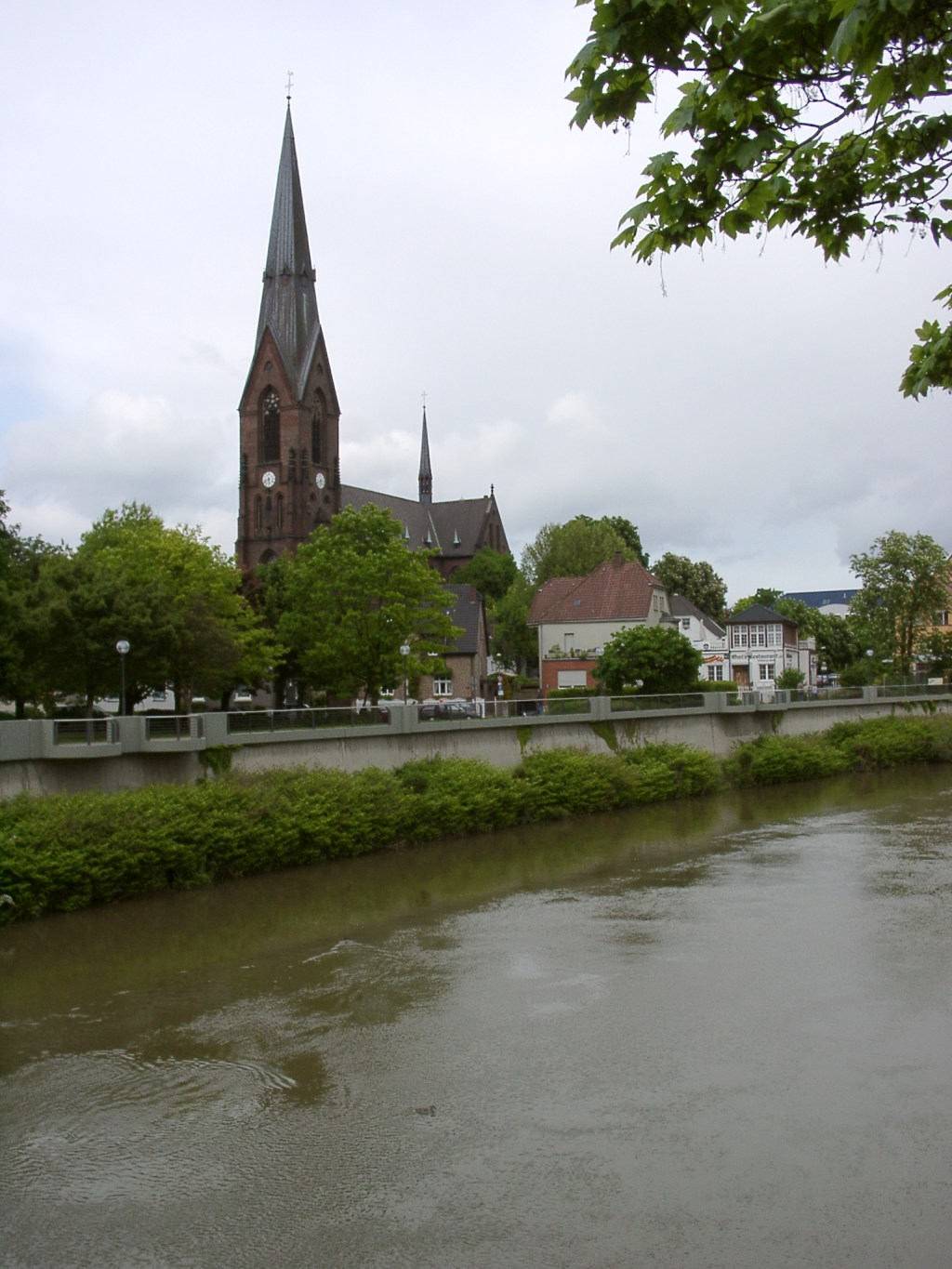 Lünen, Nordrhein-Westfalen, St. Marien-Kirche am Lippe-Ufer